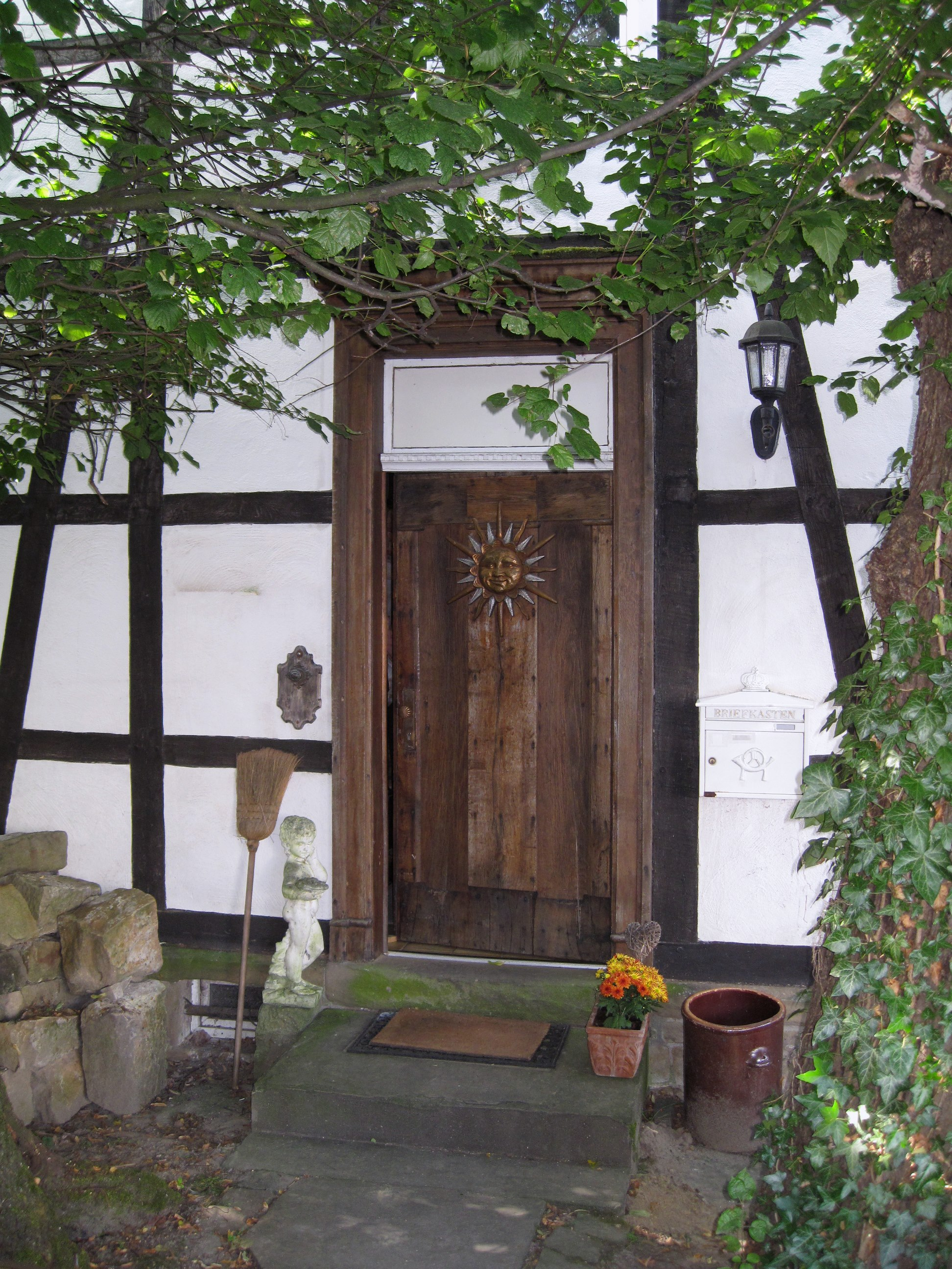 Voss'scher Hof, Fachwerkhaus von 1823, Schloßweide 2 in Schwerte-Geisecke. This image shows a heritage building in Germany, located in the North Rhine-Westphalian city Schwerte (no. A097).